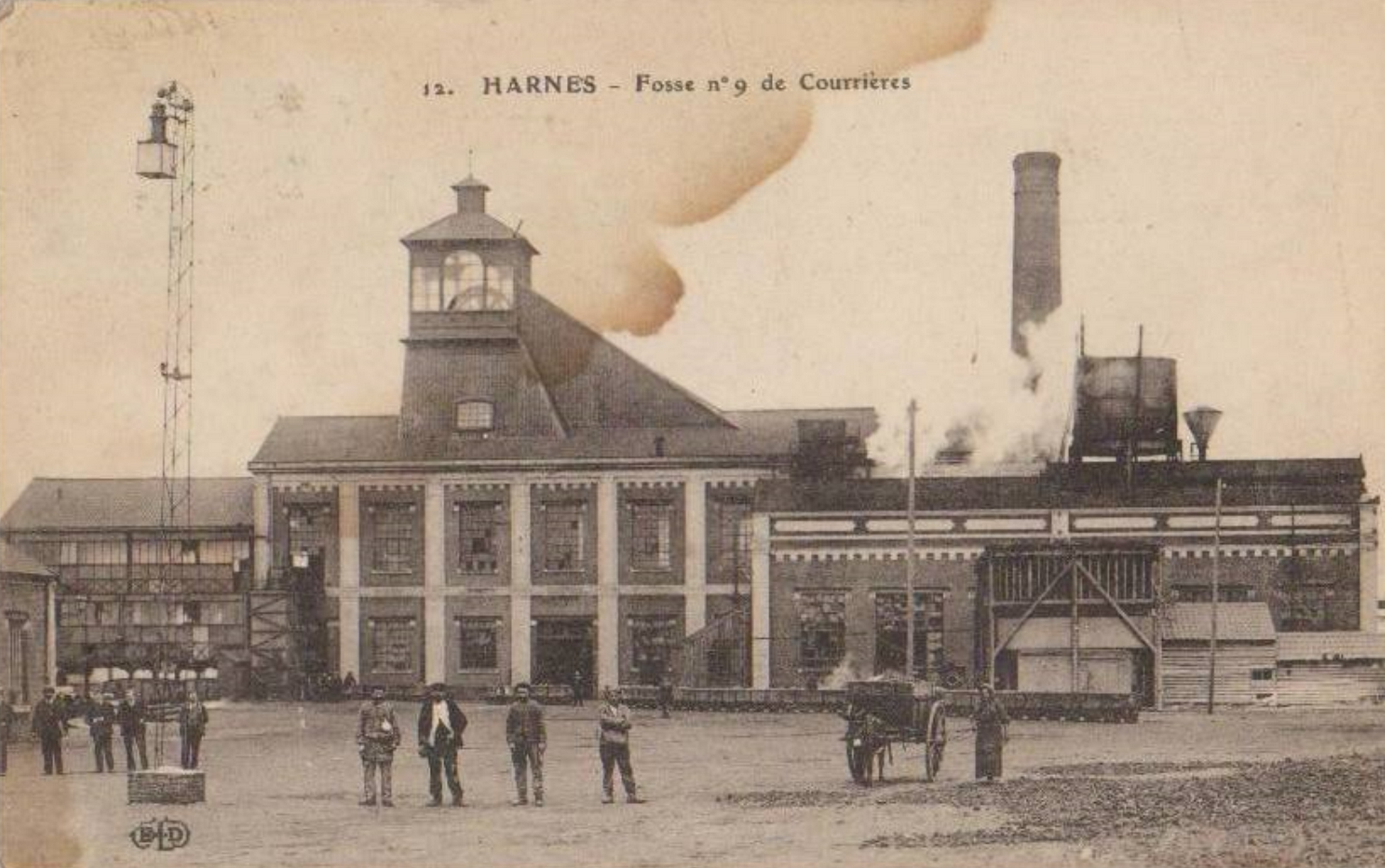 La Fosse n° 9 - 17 dite Louis Pierard de la Compagnie des mines de Courrières était un charbonnage constitué de deux puits situé à Harnes, Pas-de-Calais, Nord-Pas-de-Calais, France.